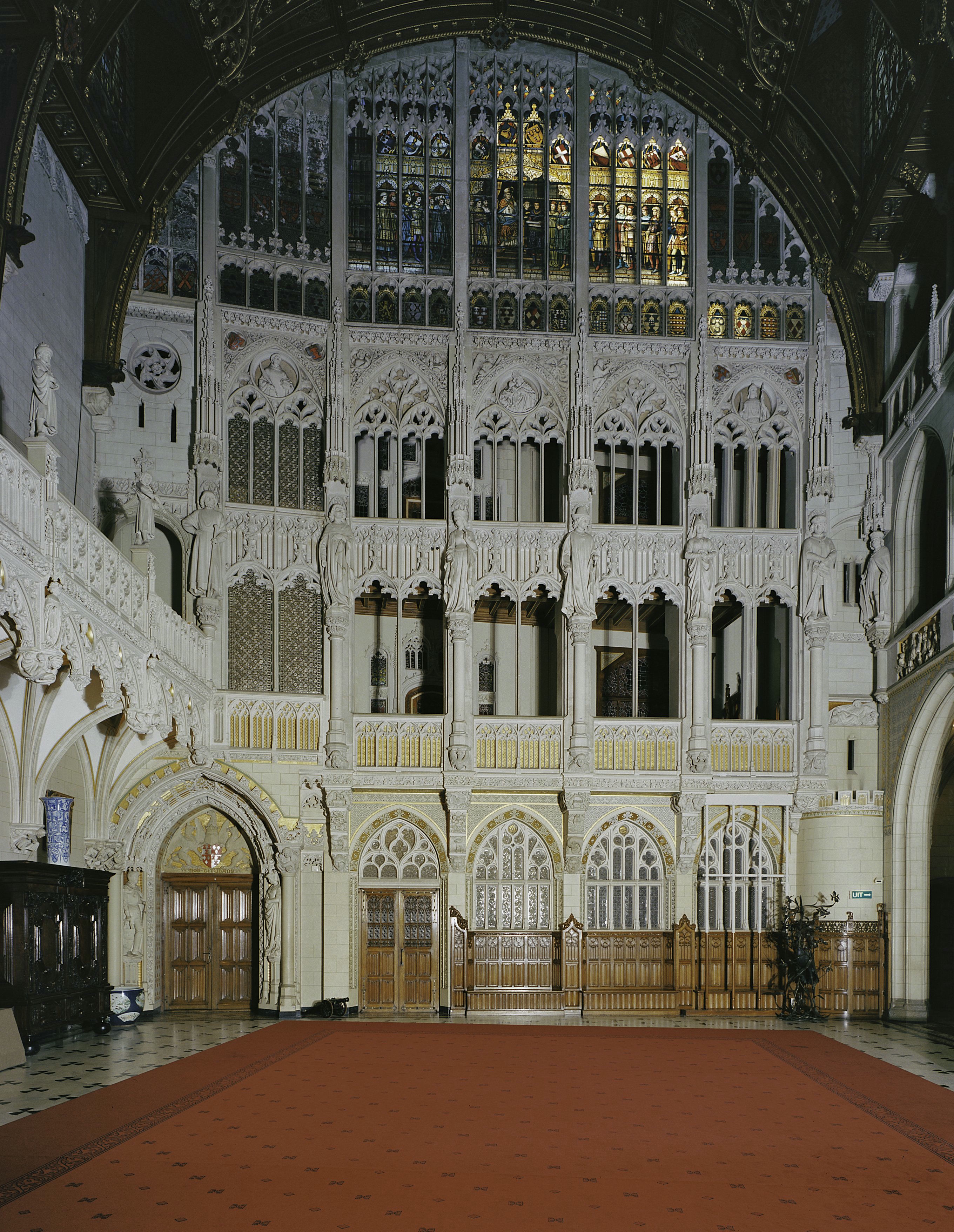 De Haar: Vertrek 0.10 (= Centrale hal) Interieur, overzicht op de noordgevel met galerijen eerste en tweede verdieping en glas-in-loodramen (opmerking: Informatie voor beschrijving geleverd door mw. Katrien Timmers (kasteel De Haar))